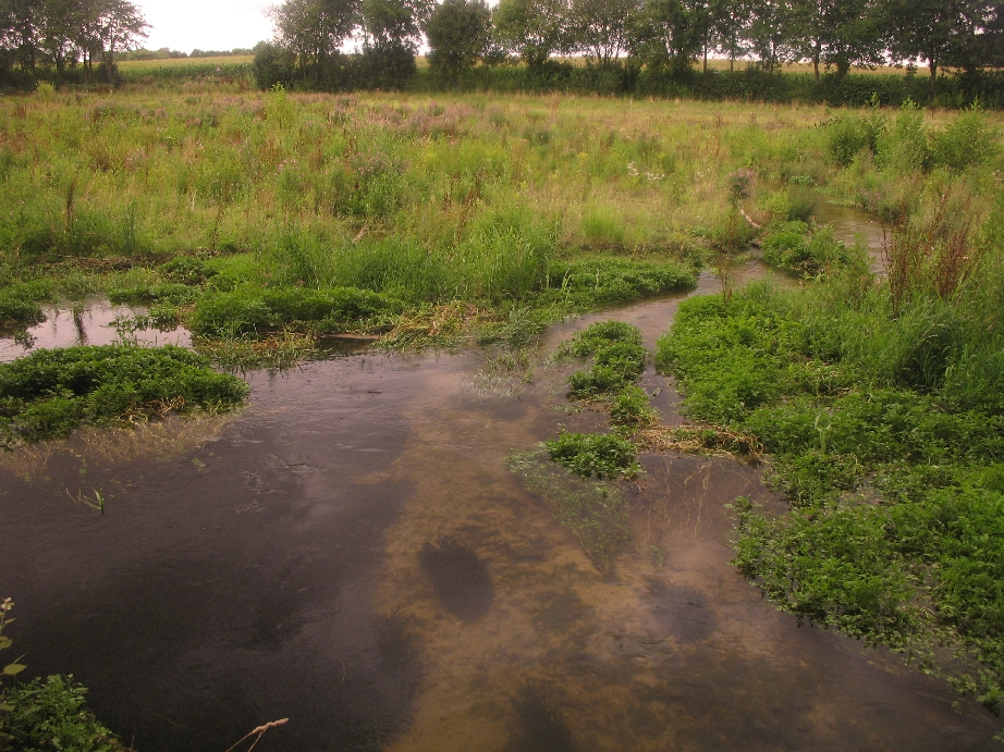 Die renaturierte Werse bei Beckum an der A 2